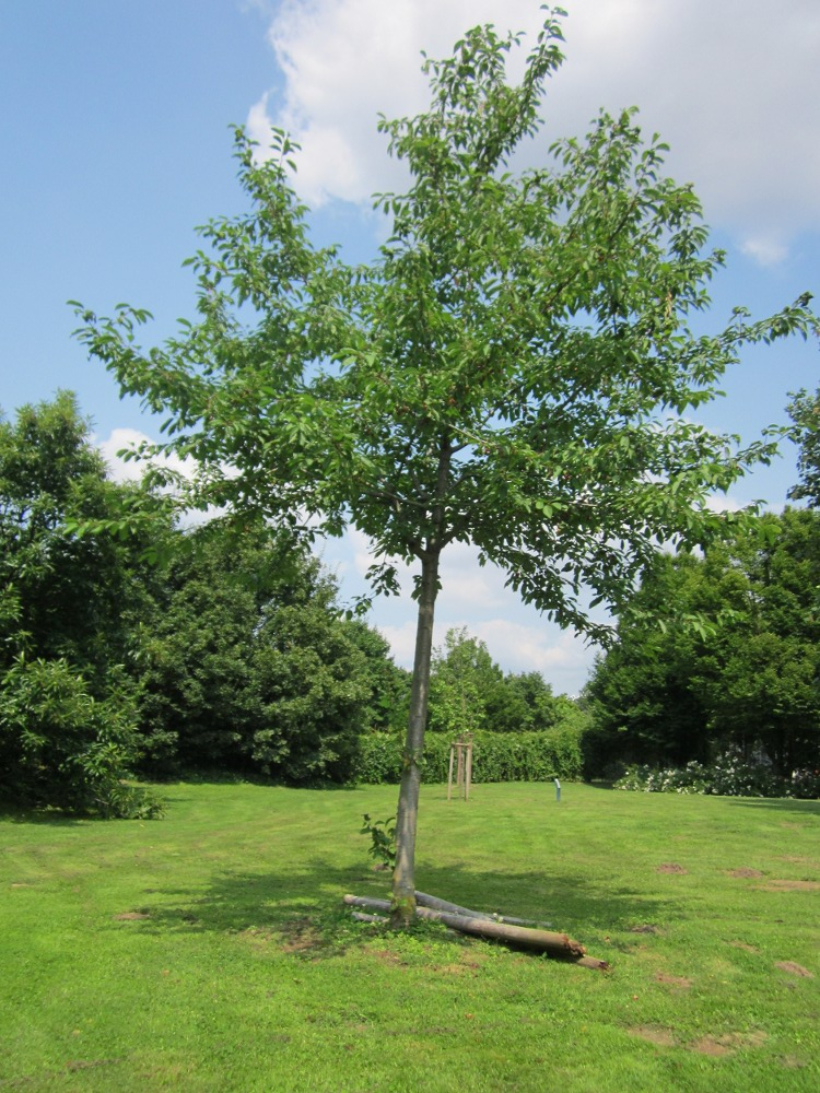 Vogel-Kirsche (Prunus avium) im Landesgartenschaupark Hockenheim